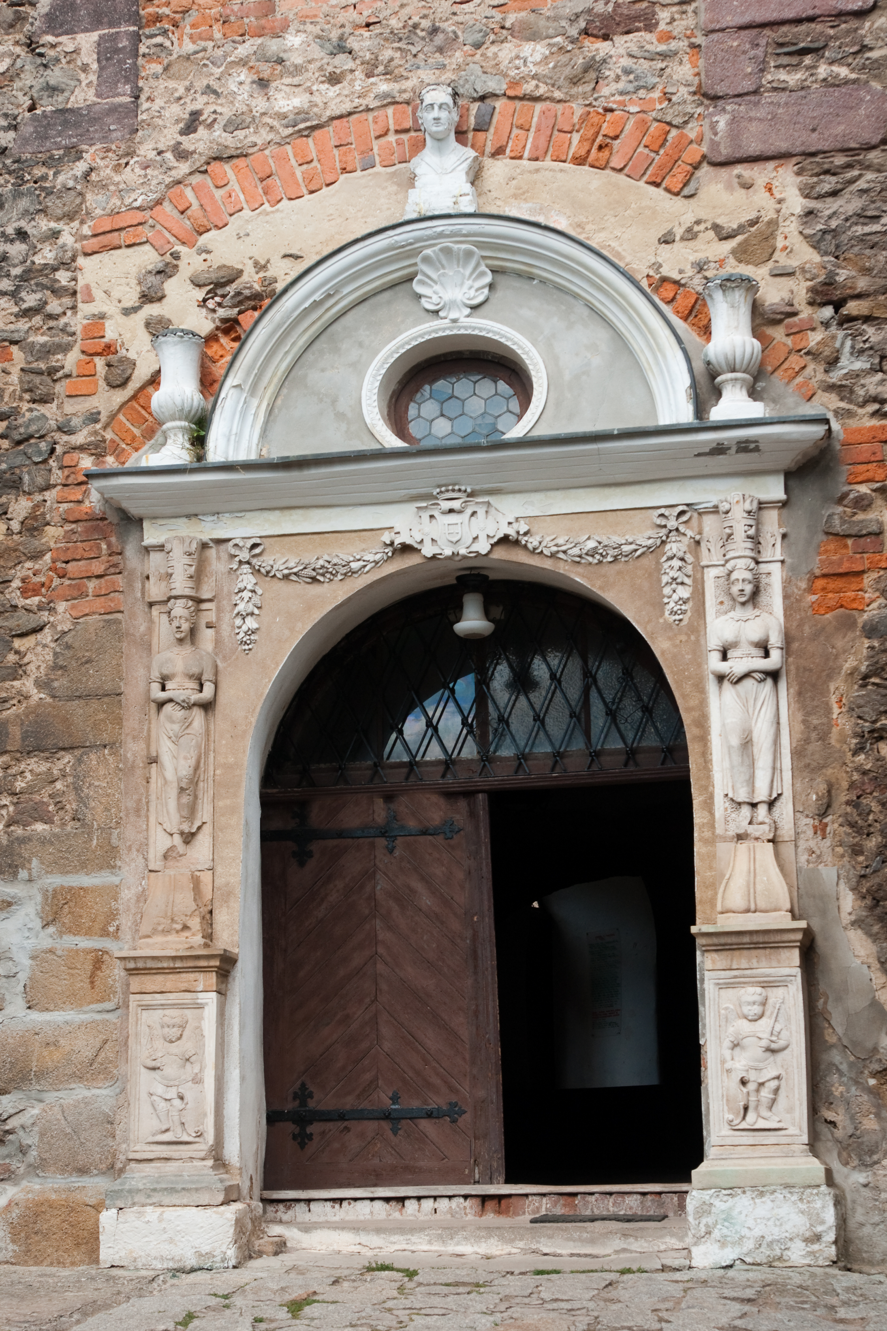 Zamek Grodno w Zagórzu Śląskim